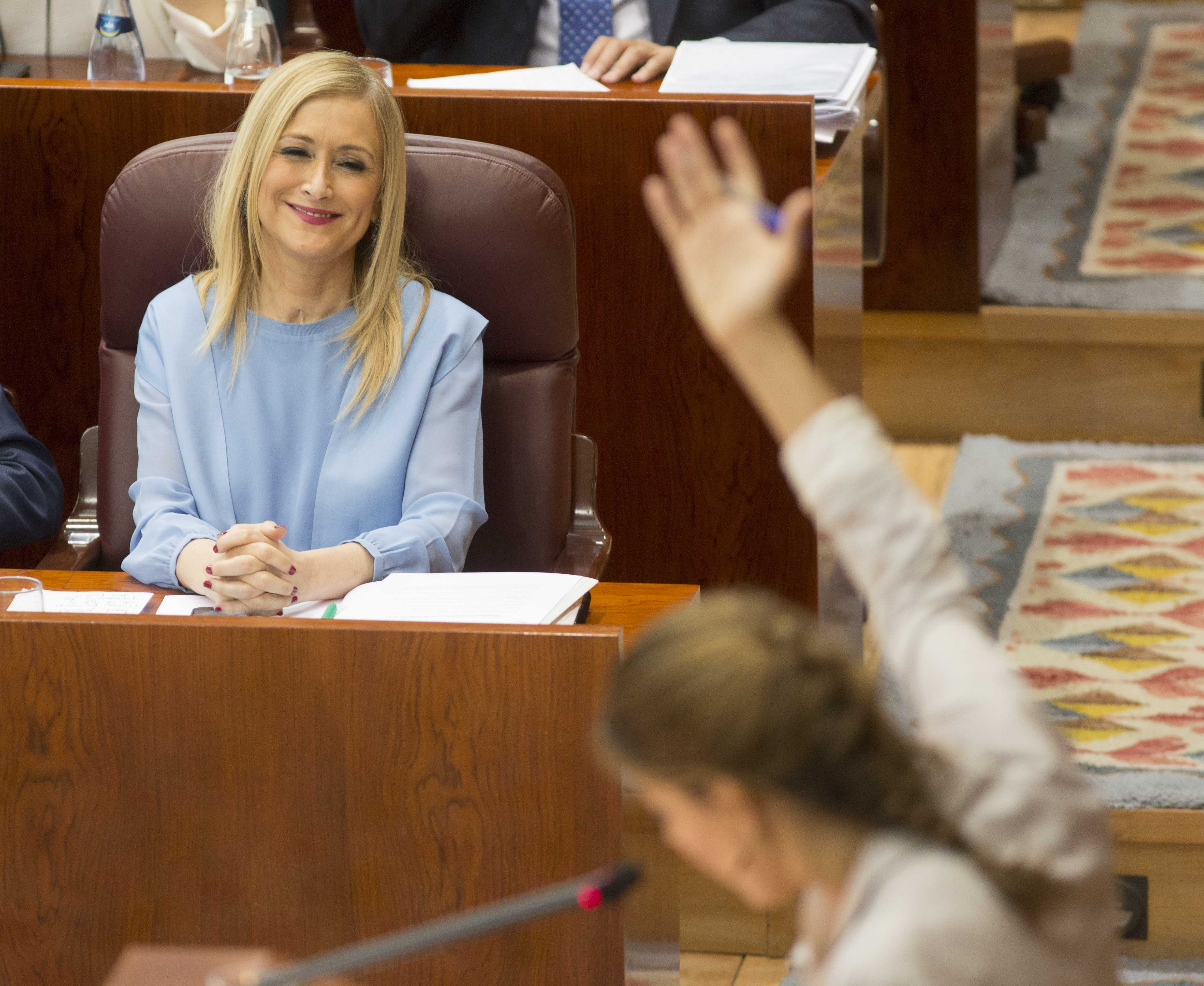 Cristina Cifuentes y Lorena Ruiz-Huerta durante la sesión de moción de censura contra la primera en el pleno de la Asamblea de Madrid en junio de 2017